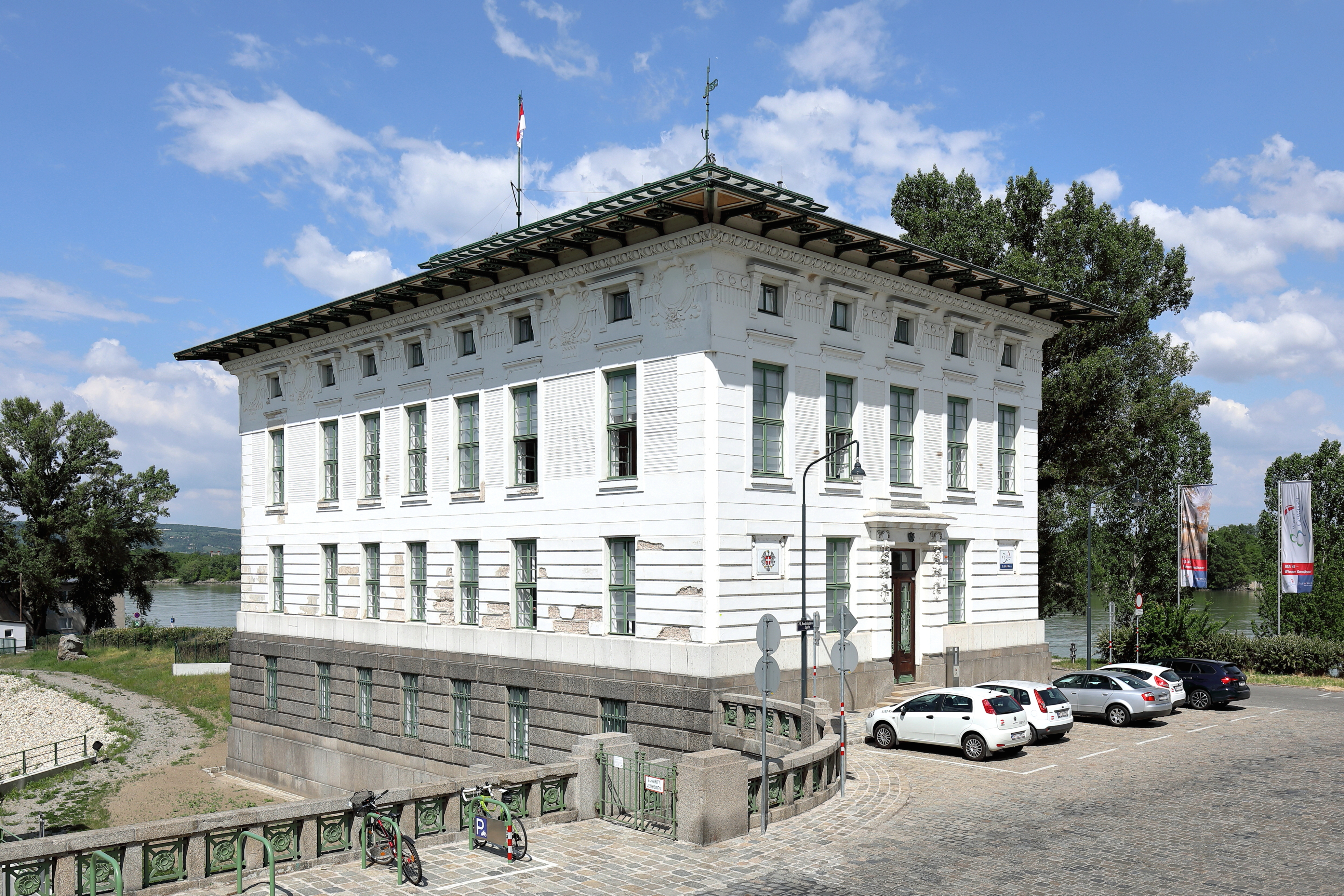 Das Verwaltungsgebäude bei der Nussdorfer Wehr- und Schleusenanlage im 20. Wiener Gemeindebezirk Brigittenau.Das Gebäude im secessionistischen Stil wurde nach Plänen von Otto Wagner für die „Donau-Regulierungs-Commission“ im Zuge des Baues der Nussdorfer Wehr- und Schleusenanlage in den 1890er Jahren errichtet. Aktuell (2018) dient das Gebäude als Zentrale der Magistratsabteilung 45 - Wiener Gewässer.